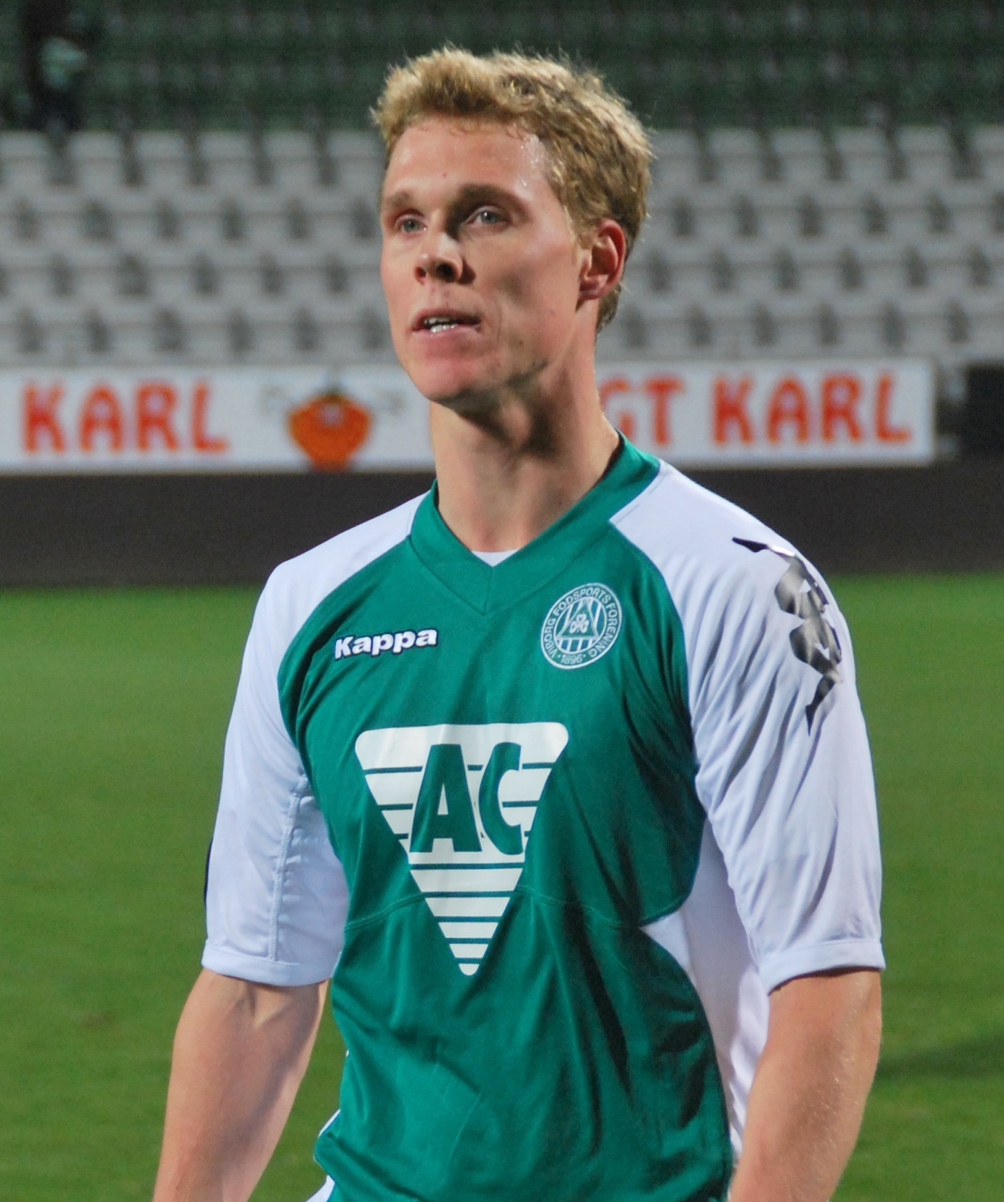 Fodboldspiller Jacob Egeris fra Viborg FF. Her under en kamp i 1. division imellem Viborg FF og FC Fredericia på Viborg Stadion.